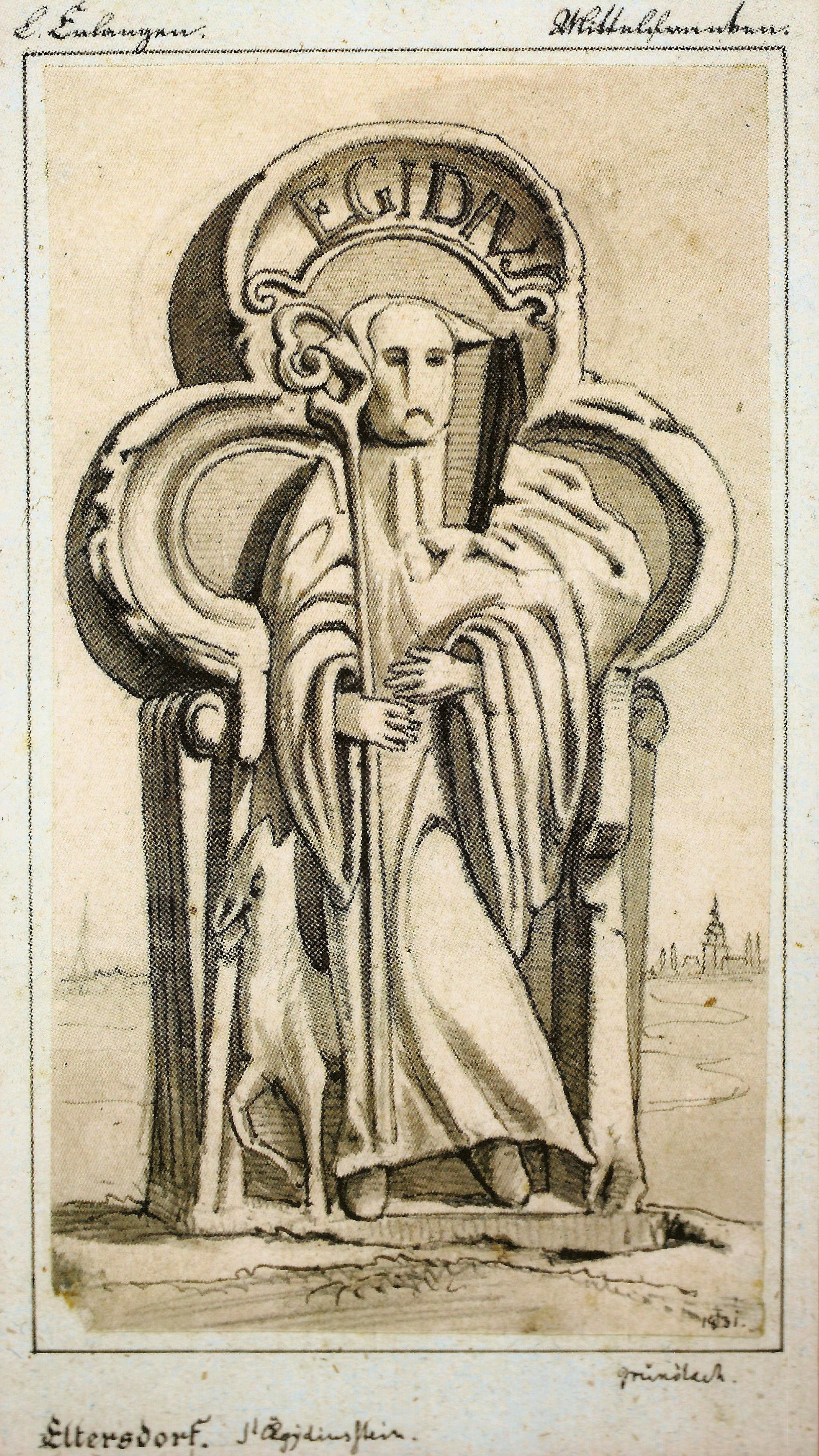 Zeichnung des Egidienstein in Erlangen-Eltersdorf